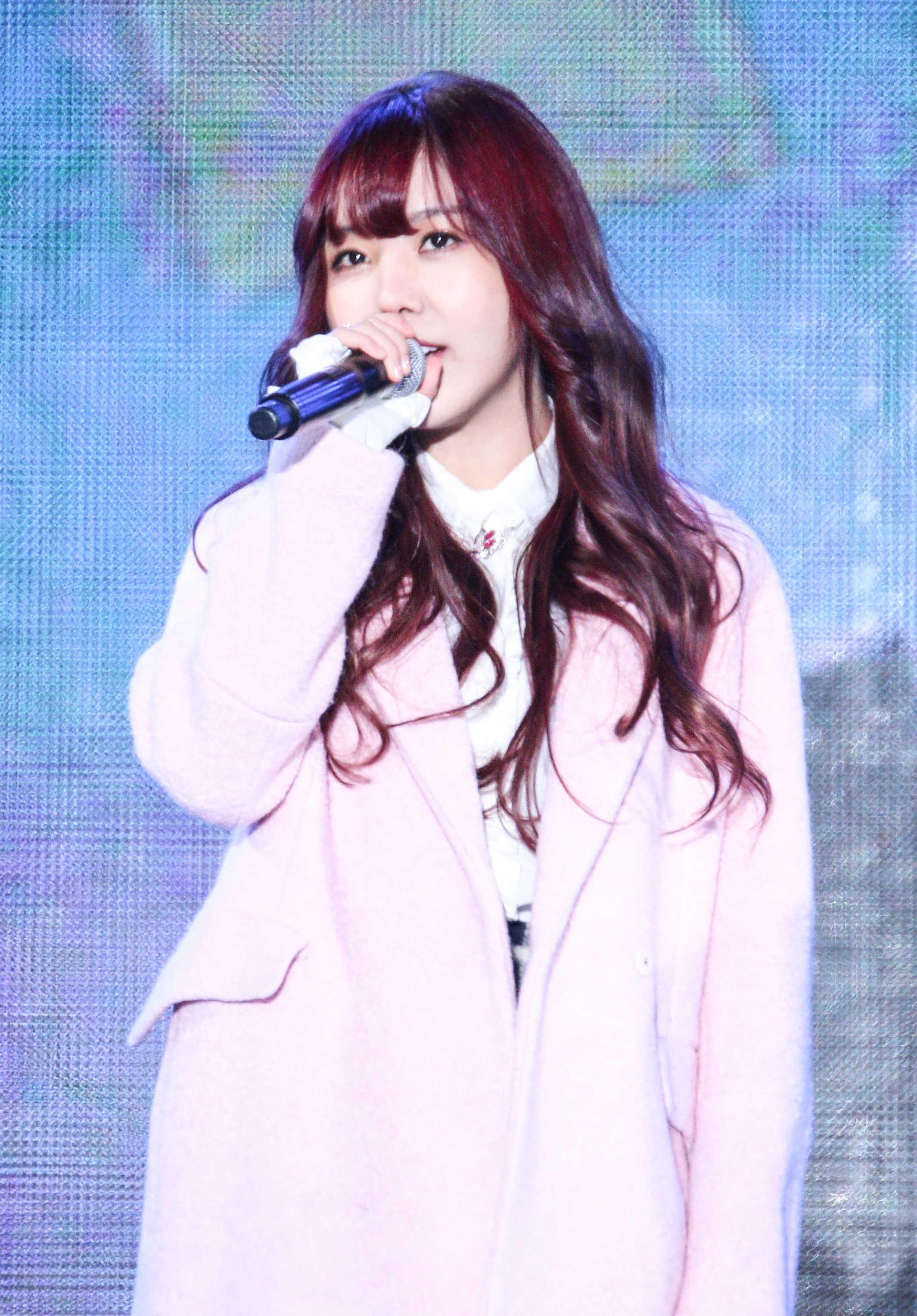 141211 레이나 더쇼 in 코엑스 야외무대